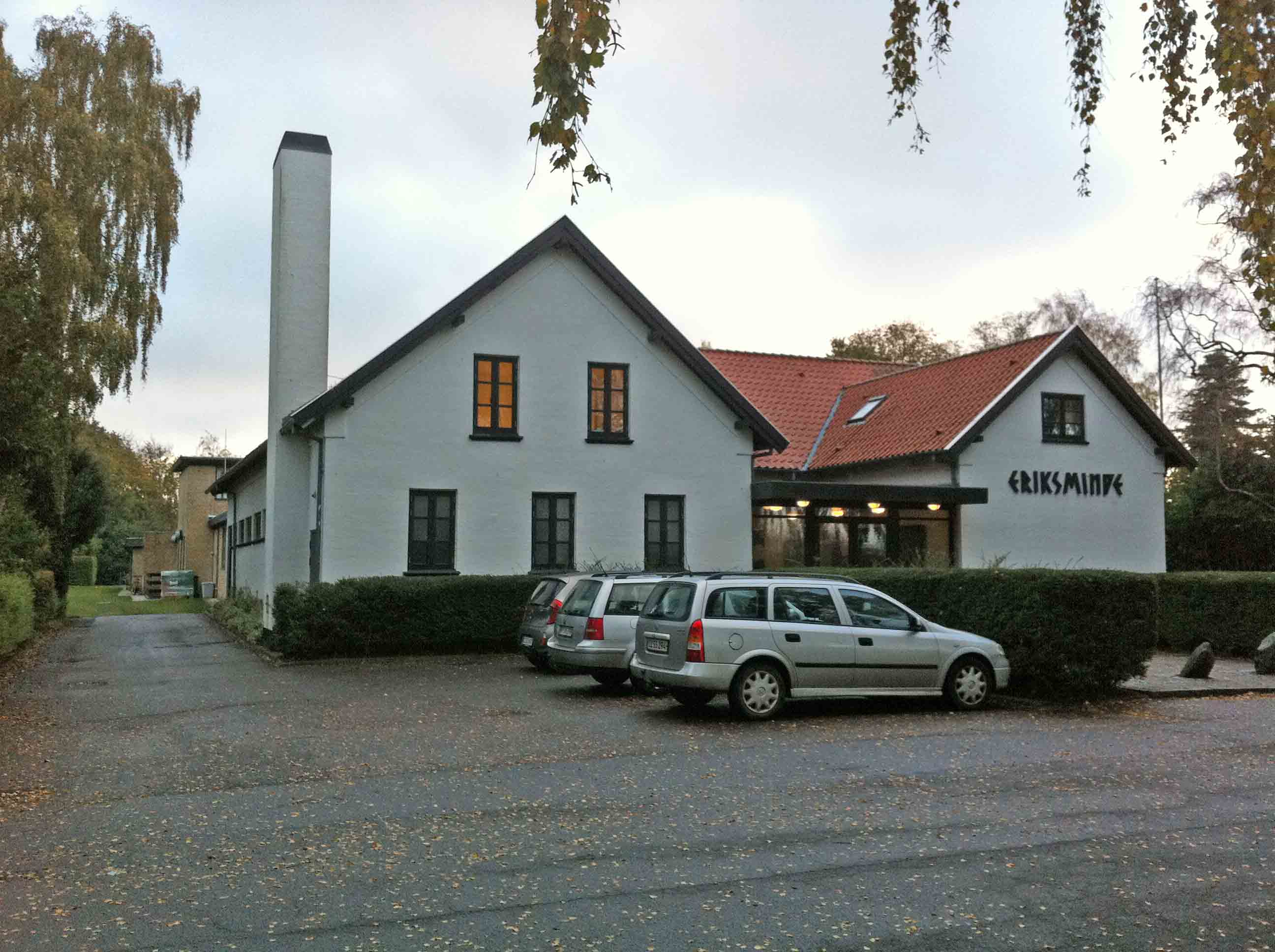 Eriksminde Efterskole